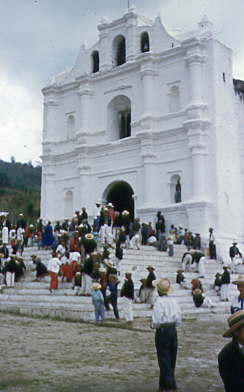 Iglesia de Chajul, Guatemala. 1956-57